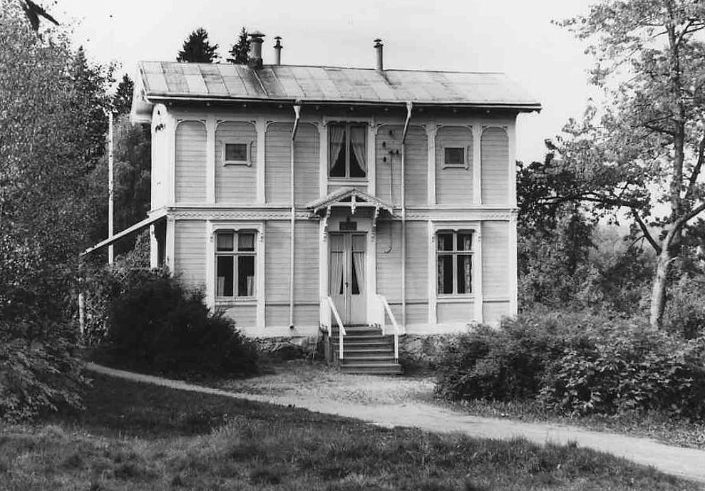 Villa Tusculum i Skärholmen (brann ner i april 1981)